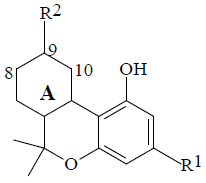 Дибензопираны